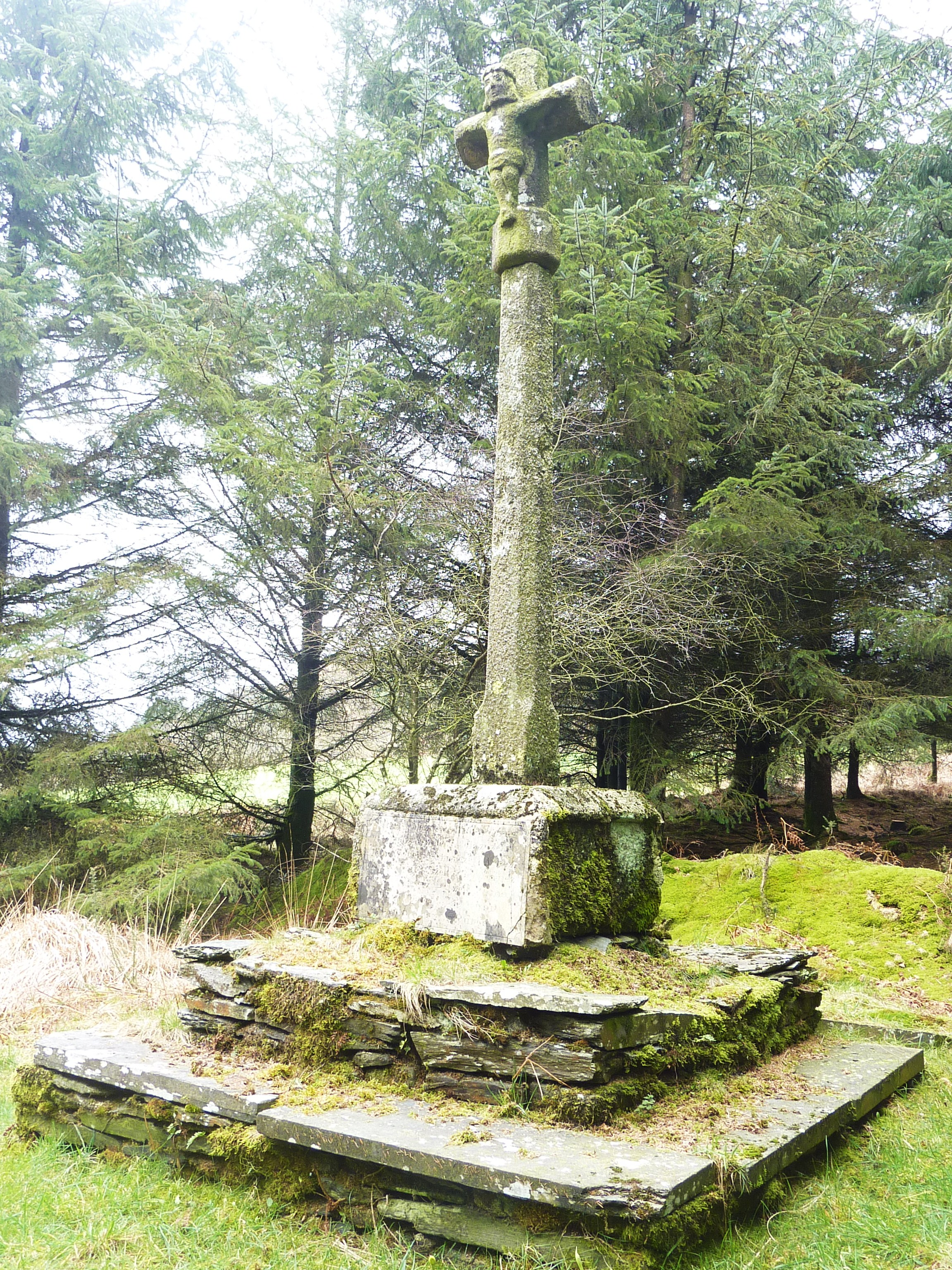 Commana : Croix monumentale de Croas Melar censée commémorer la bataille de 1171 lorsque le vicomte de Léon Guyomarch IV est lourdement battu à Croas-Mélar près de Commana par le duc de Bretagne Conan IV de Bretagne et ses alliés anglais